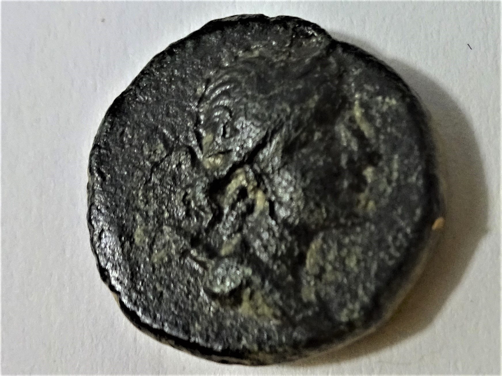 Bronzemünze aus Termessos mit Artemiskopf, ca. 71 - 39 v. Chr. Szaivert/Sear 5612